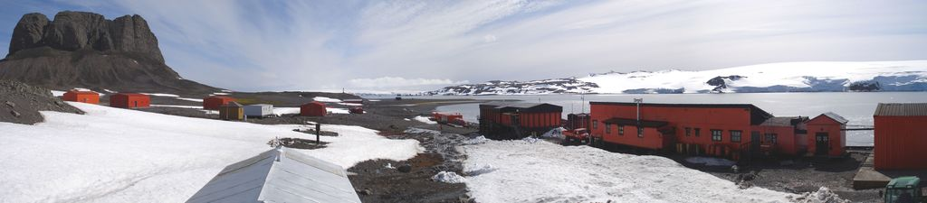 Vista panorámica de la Base Argentina Carlini en la Isla 25 de Mayo en la Antártida.